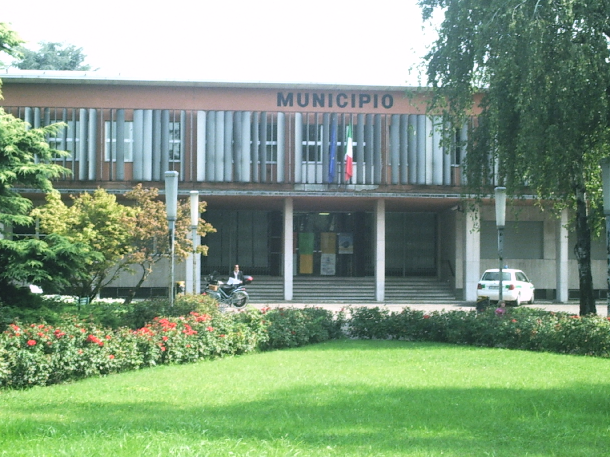 Piazza della Vittoria e Municipio